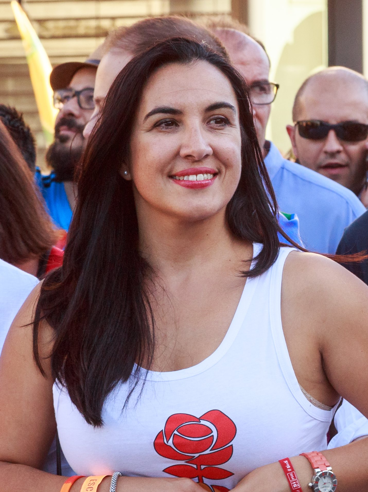 Francisco Polo, Mónica Silvana, Javier Maroto. Manifestación WorldPride 2017. Madrid.